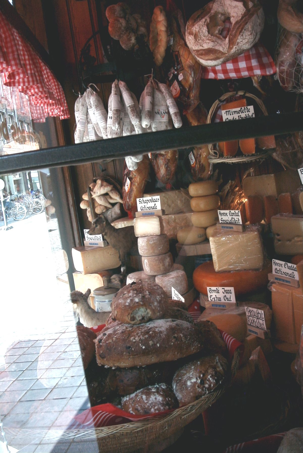 Brugge-i sajtbolt kirakata, Belgium